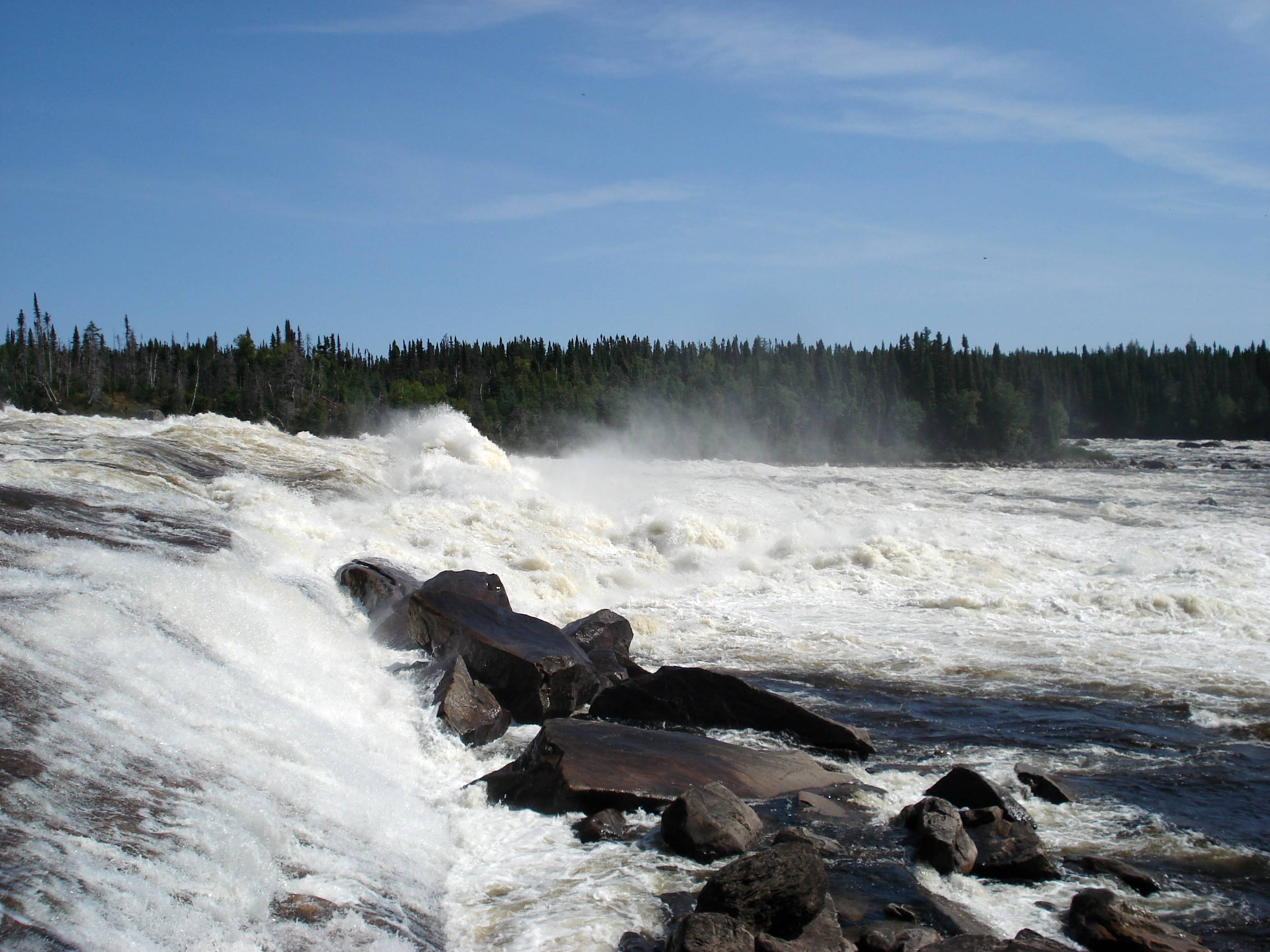 Vue sur la rivière Rupert / View on Rupert River